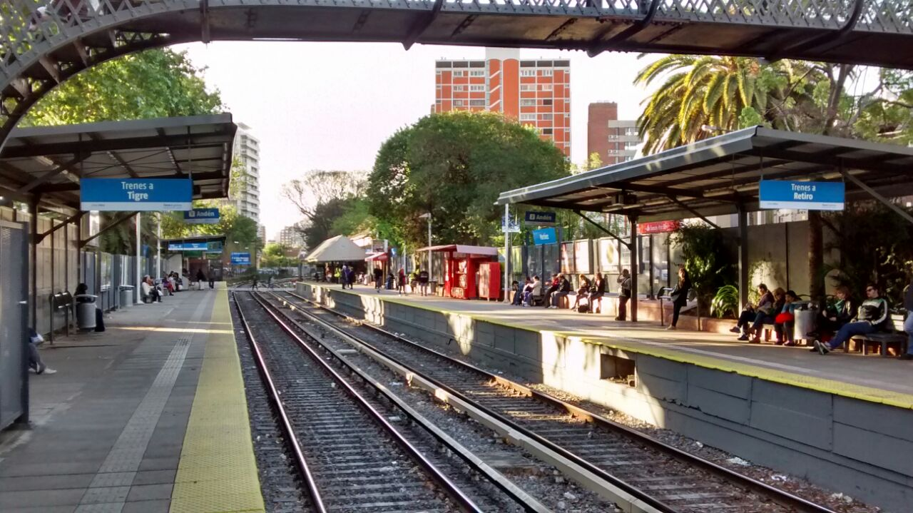 Estación